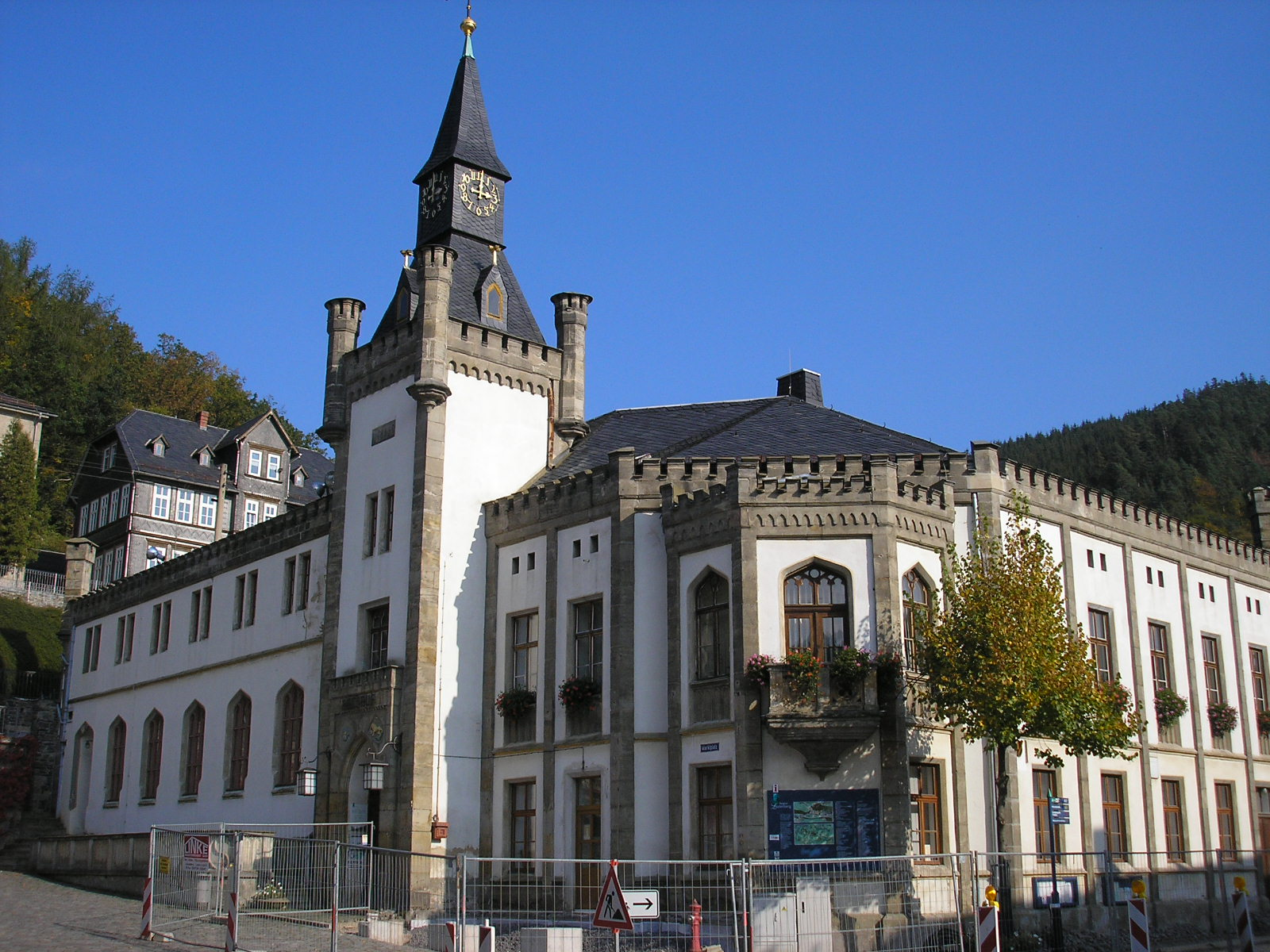 Das Rathaus von Leutenberg (Thüringen).